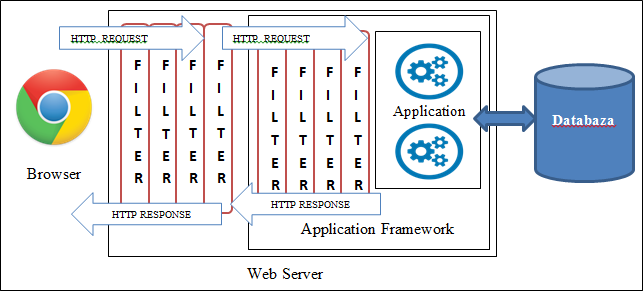 Puna e filterit